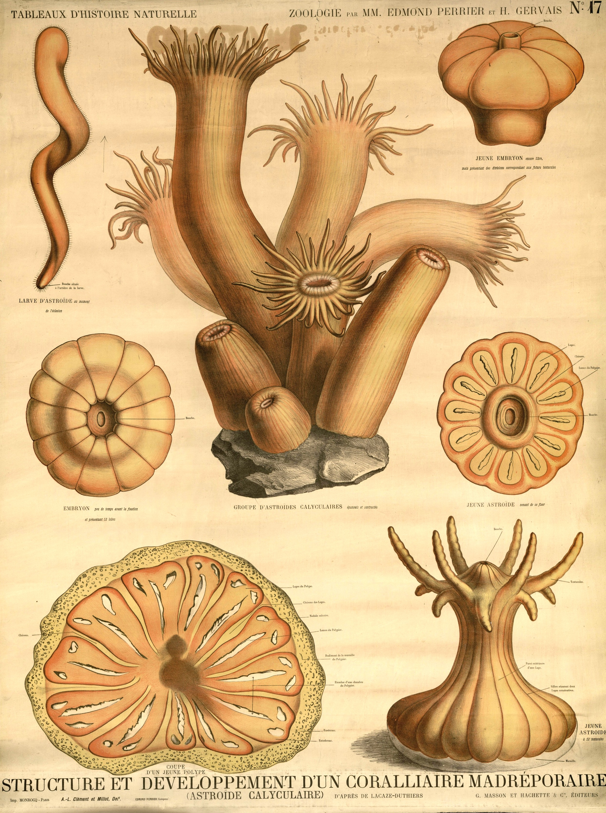 Structure et développement d'un coralliaire madréporaire. Bibliothèque Numérique de l'Université d'Artois. Retrieved on 26 March 2016.